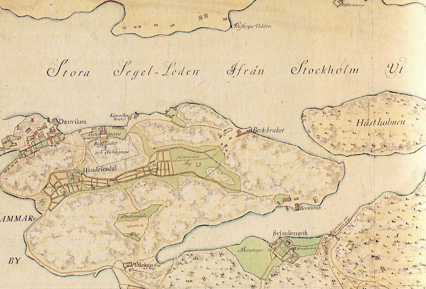 Del av karta över Sicklaön från 1744